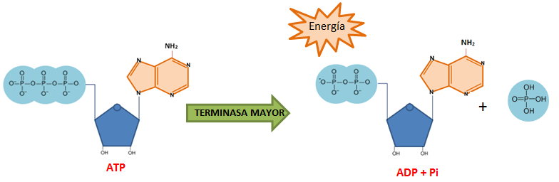 Proceso de obtención de energía mediante la hidrólisis de ATP producida por la subunidad mayor de la terminasa vírica.